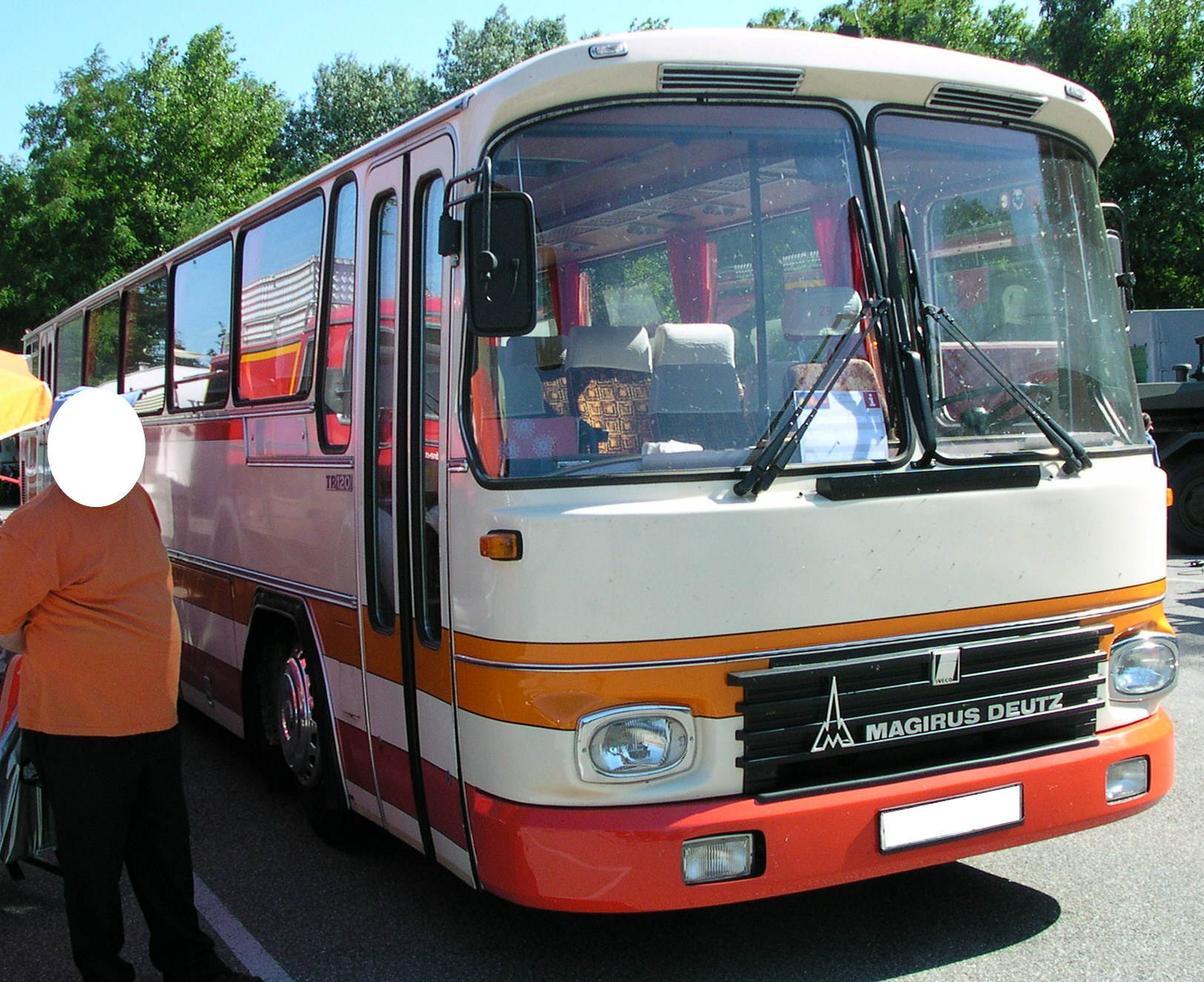 Wörth am Rhein, Oldtimer-Treffen bei Daimler-Chrysler Magirus Reisebus TR 120.